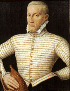 Portrait of Gebhard Truchsess von Waldburg (1547-1601)